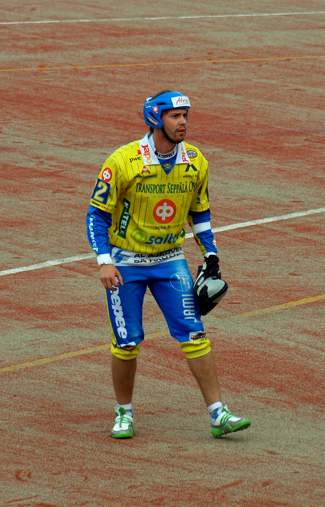 Alajärven Ankkurit - Vimpelin Veto pesäpallo-ottelu 10.8.2014. Kuvassa Kari Kellokoski.